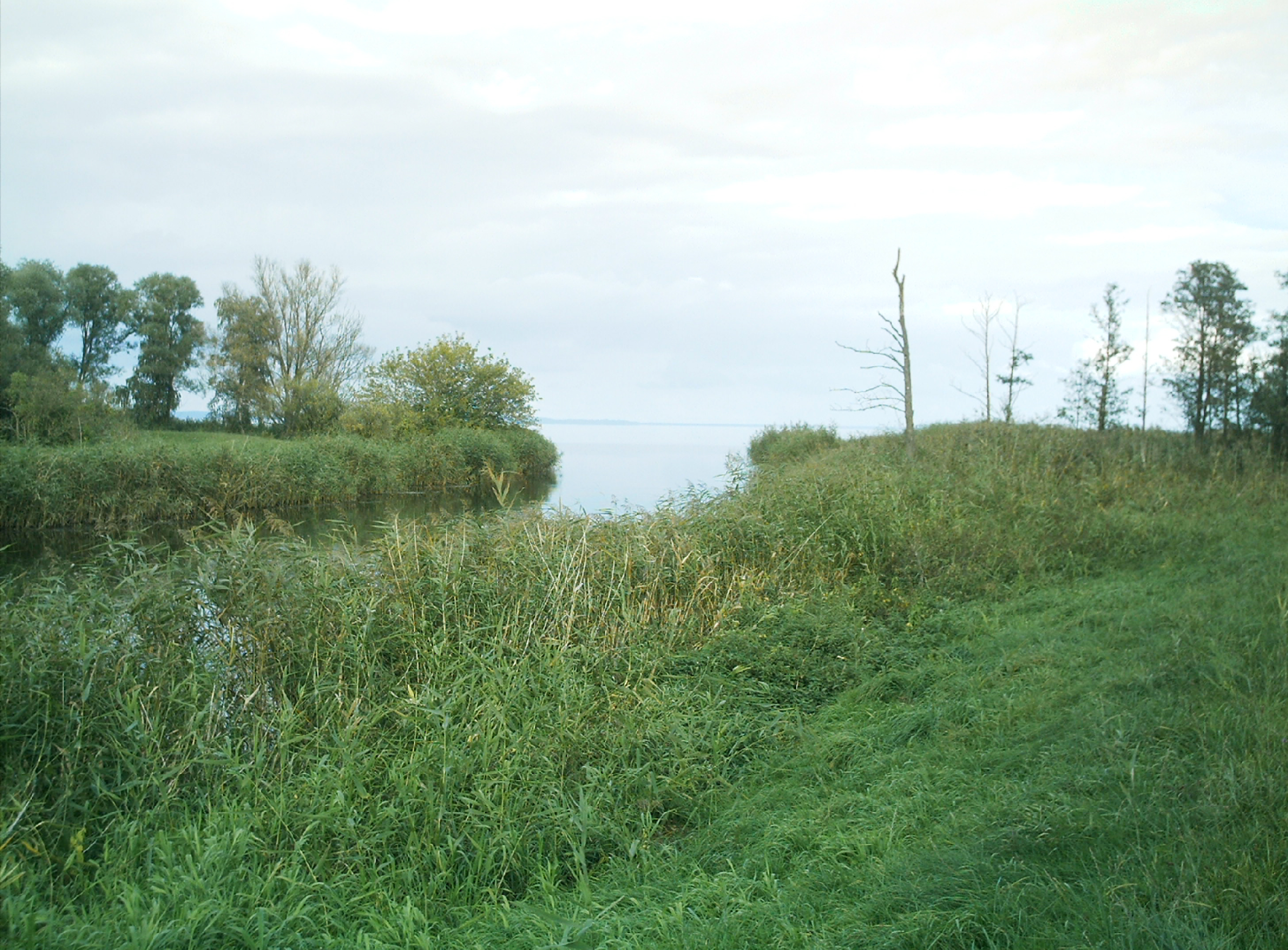 Mündung der Zarow ins Stettiner Haff